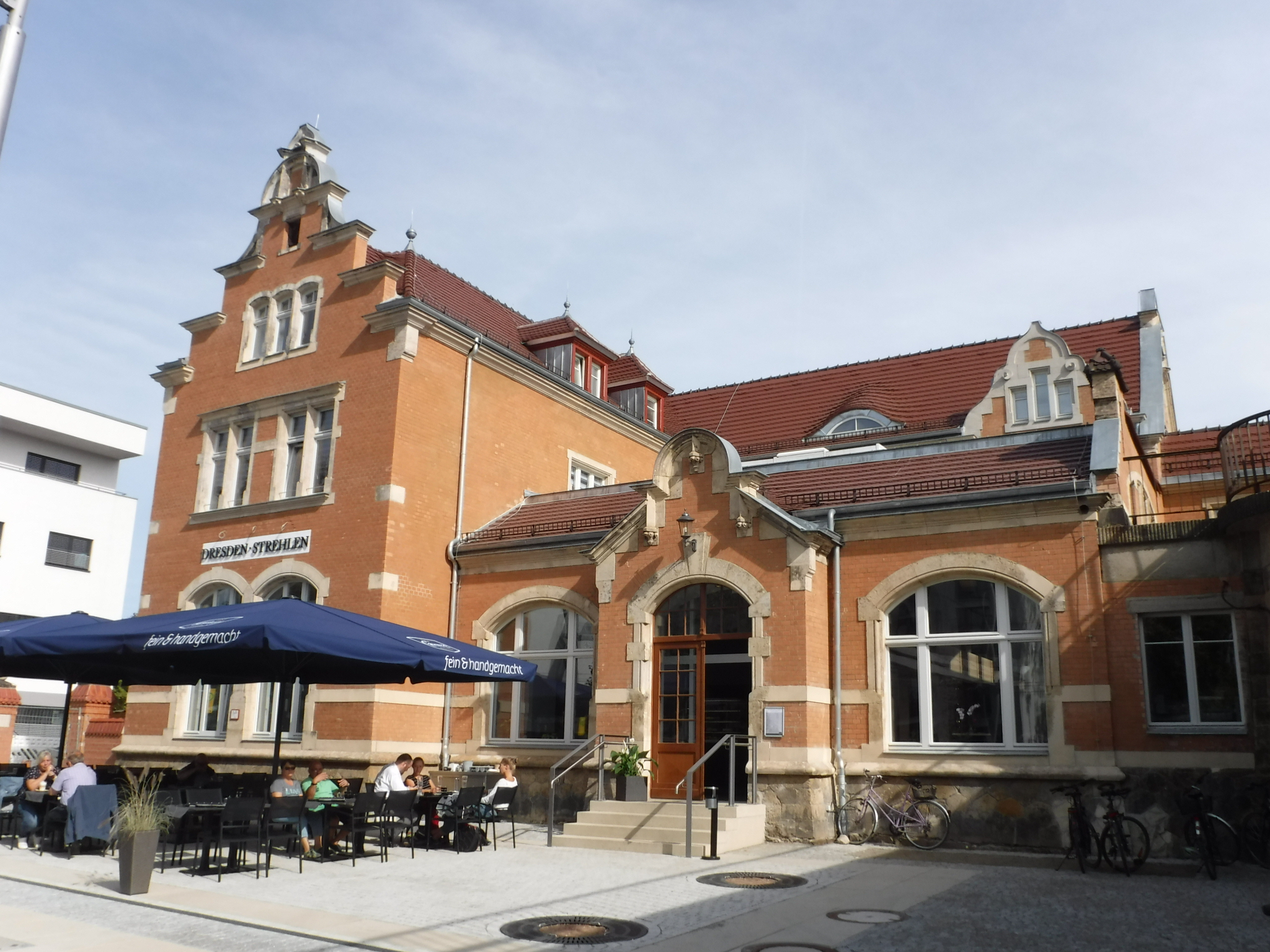 Denkmalgeschützter Haltepunkt Dresden-Strehlen, Oskarstraße 14